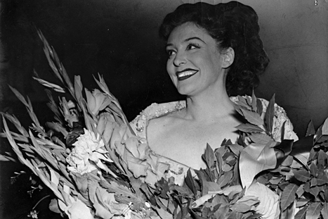 'Vill du se en stjärna ...' Sångerskan och skådespelerskan Zarah Leander med blommor i famnen efter en konsert på konserthuset i Stockholm i augusti 1949.